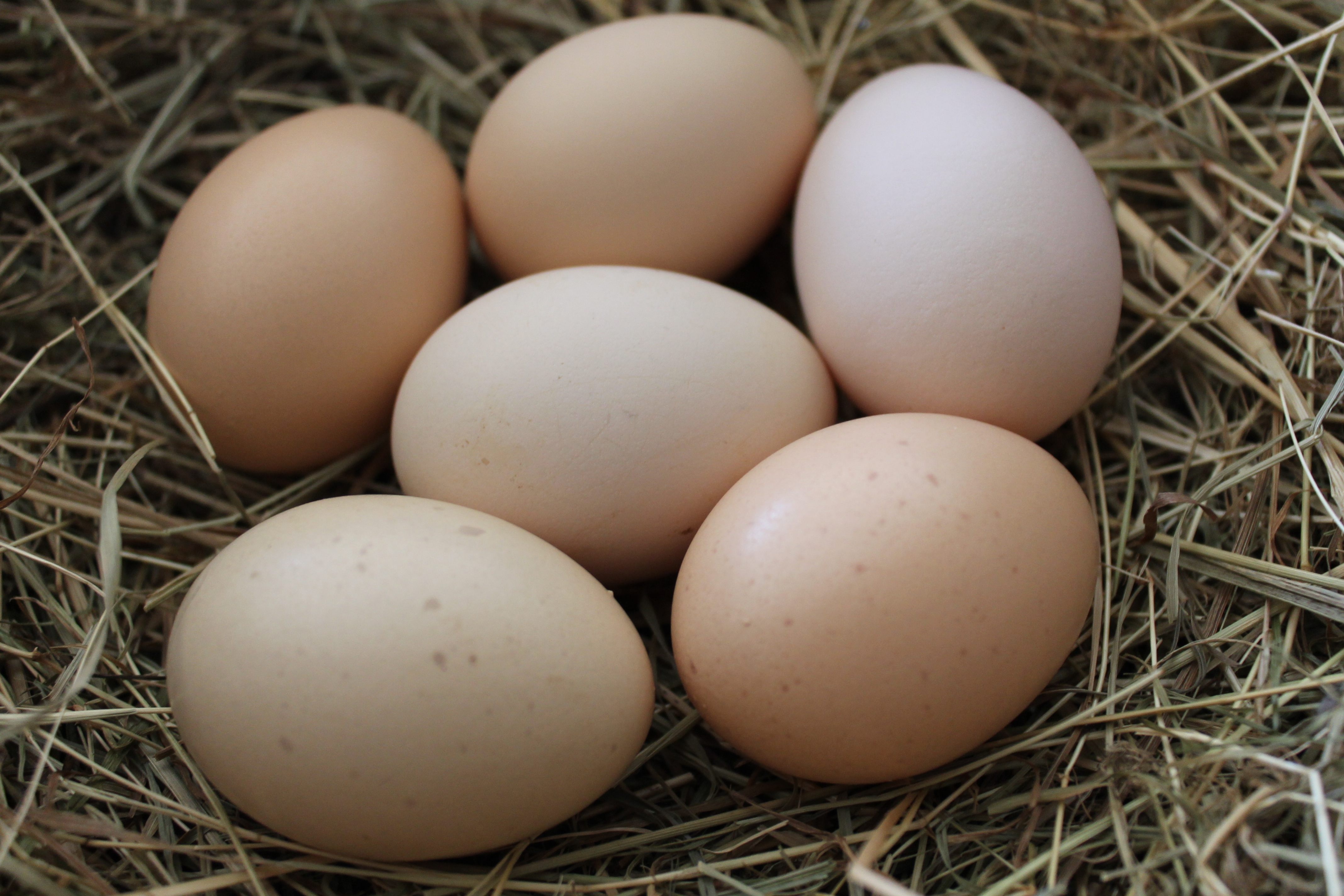 Eier der Cubalaya. Ihre Legeleistung liegt pro Henne etwa bei 120 Eiern im Jahr.